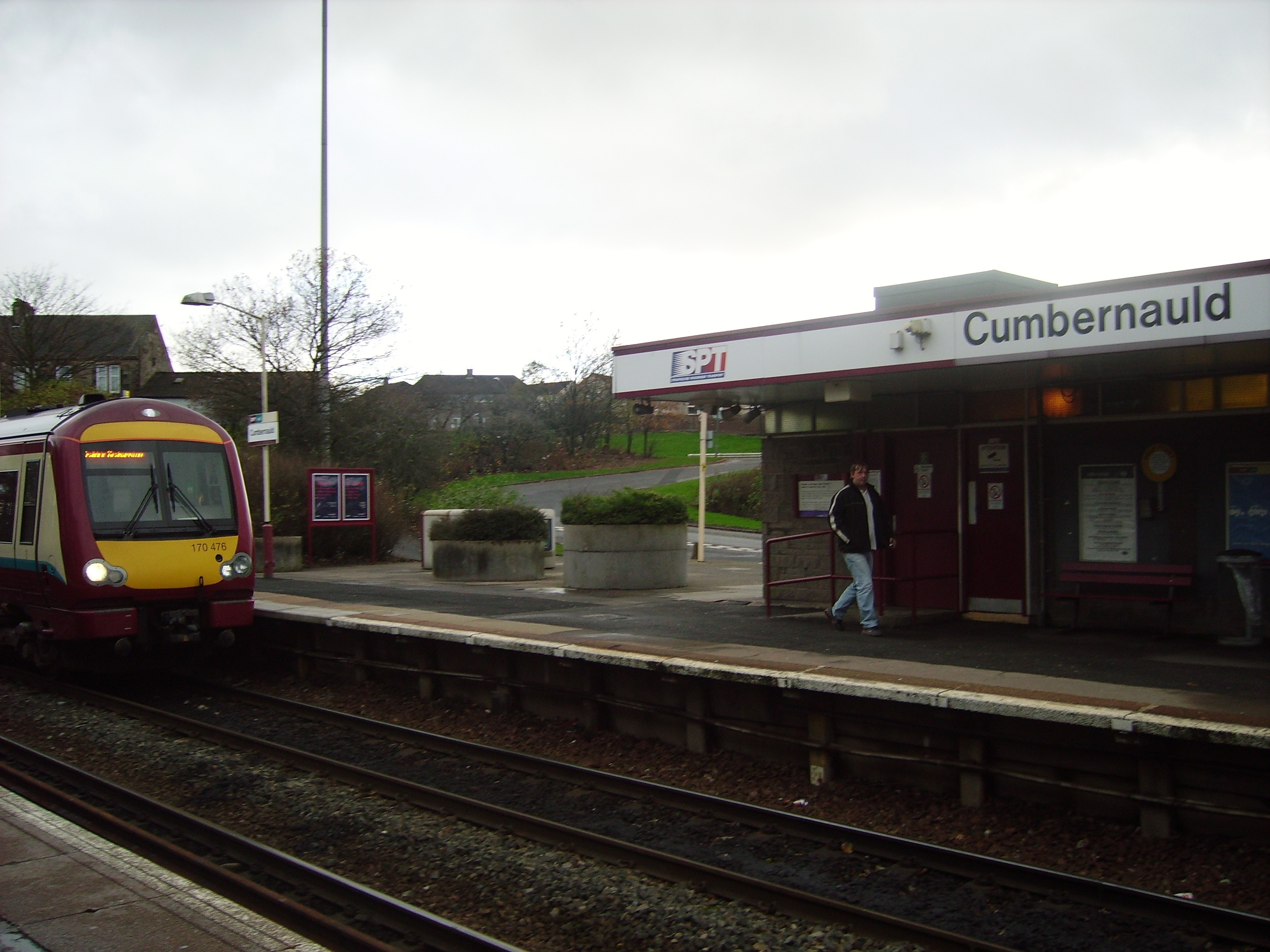 my pic